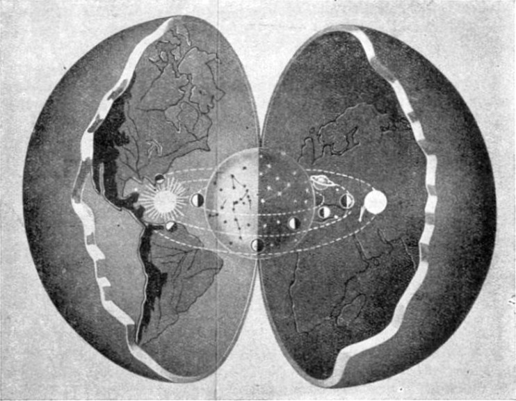 "Hohlwelt"; Quelle: Kongress Astrologischer Pioniere, Erfurt 1932, S. 68